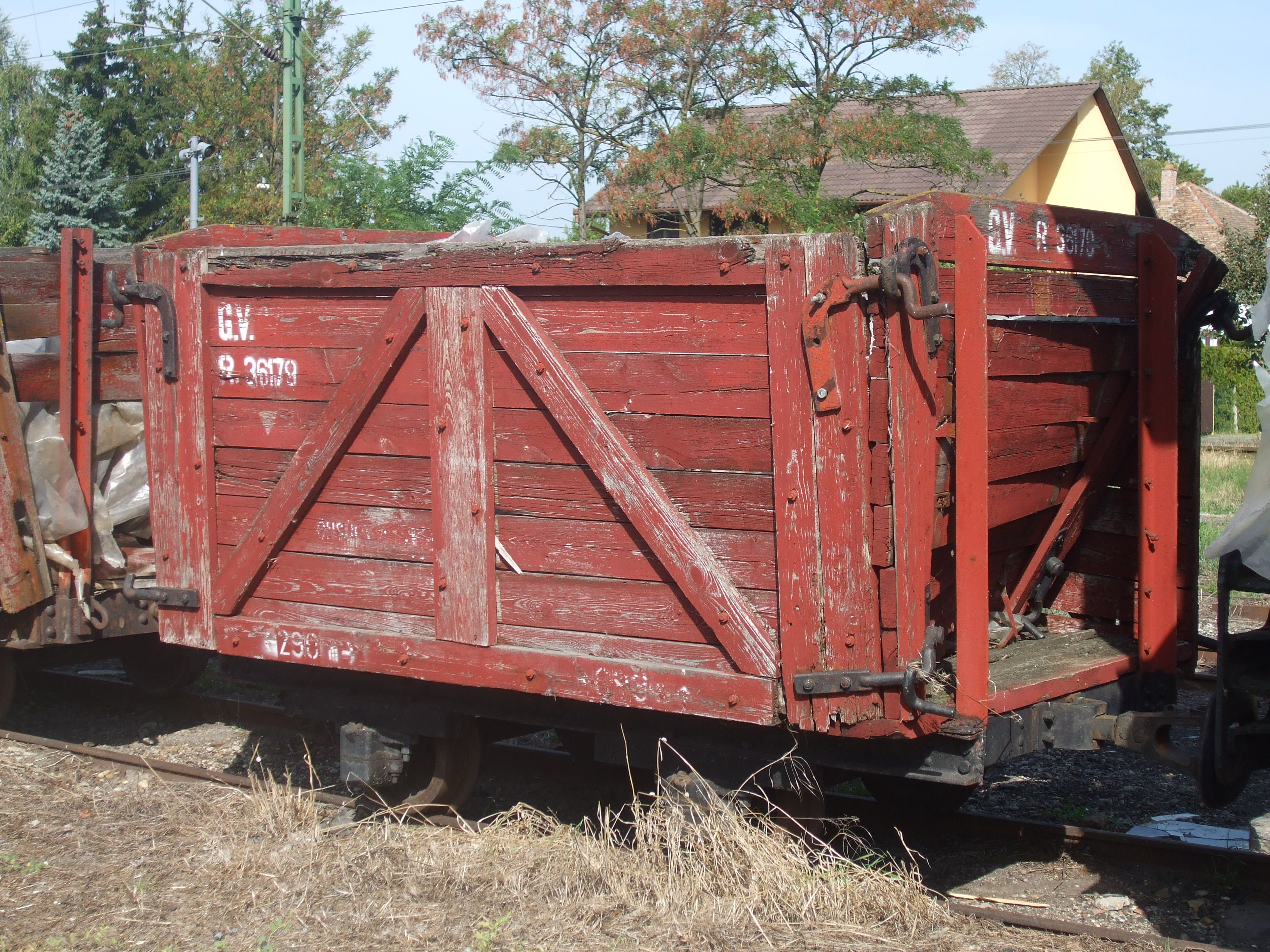 Romos állapotú R lóré félreállítva a Balatonfenyvesi Gazdasági Vasúton.